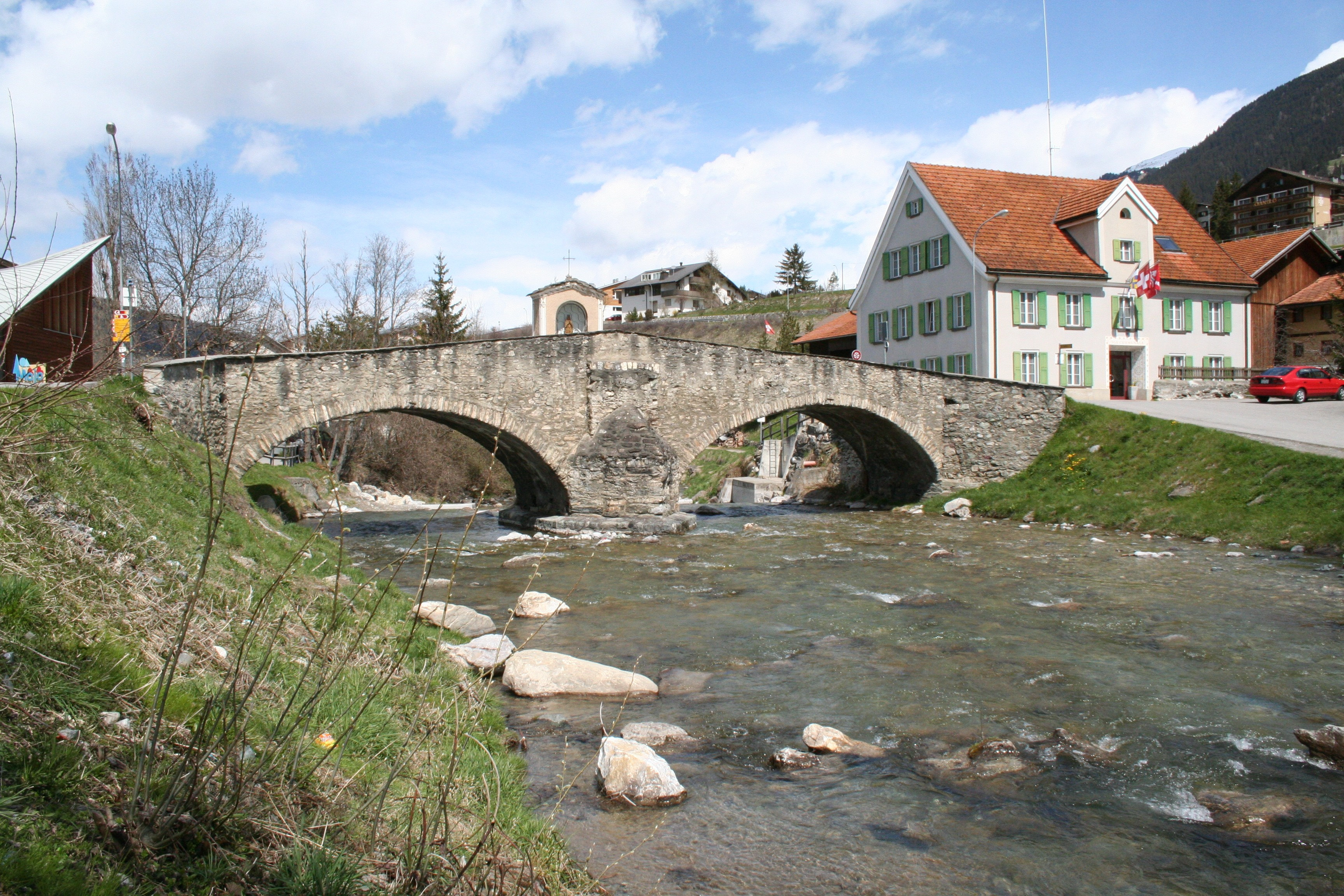 Die Julia in SavogninRumantsch: La Gelgia e la punt crap a Savognin